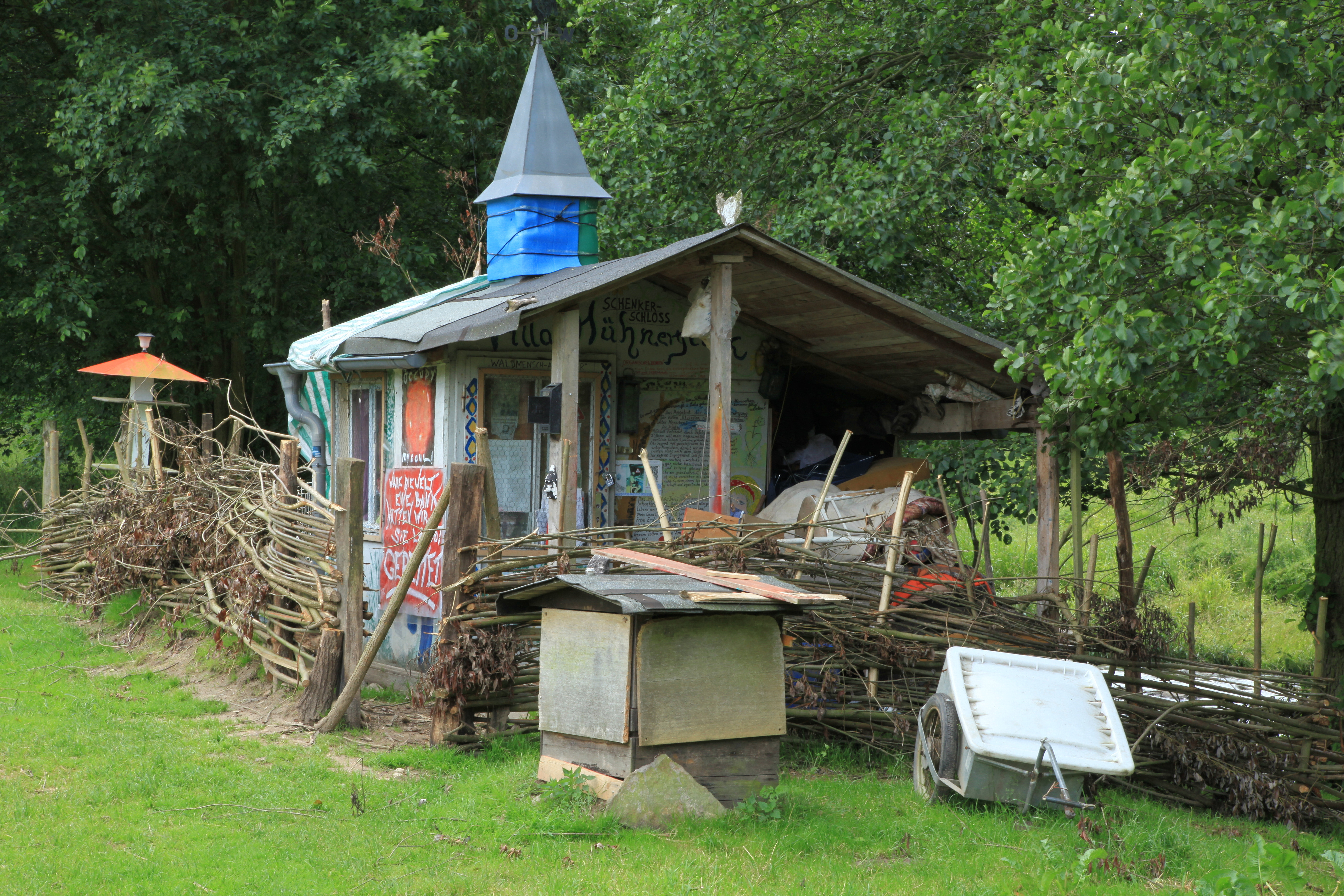 Villa Hühnerglück, ehemaliger Hühnerstall, Wohnung des „Waldmenschen“ Jürgen Wagner (Öff Öff) in der Georgewitzer Skala in Löbau